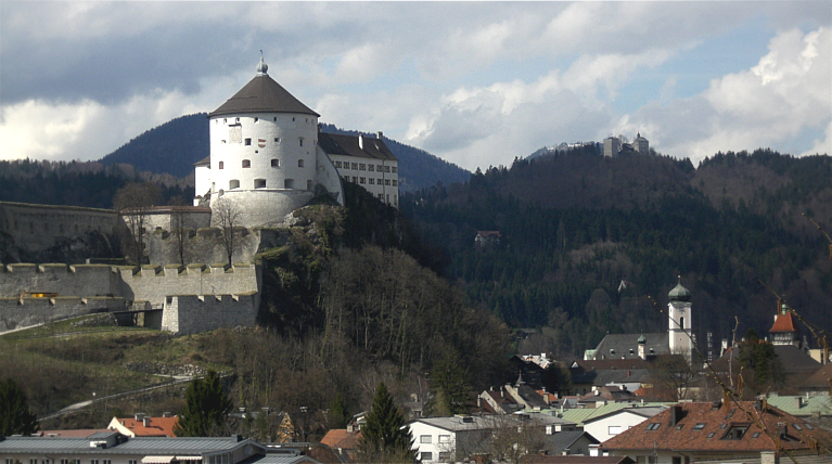 Kufstein - Im Bild die Festung Kufstein, die Ruine Thierberg auf dem Berg im Hintergrund und neben dem Kirchturm das Schloss Hohenstaffing.